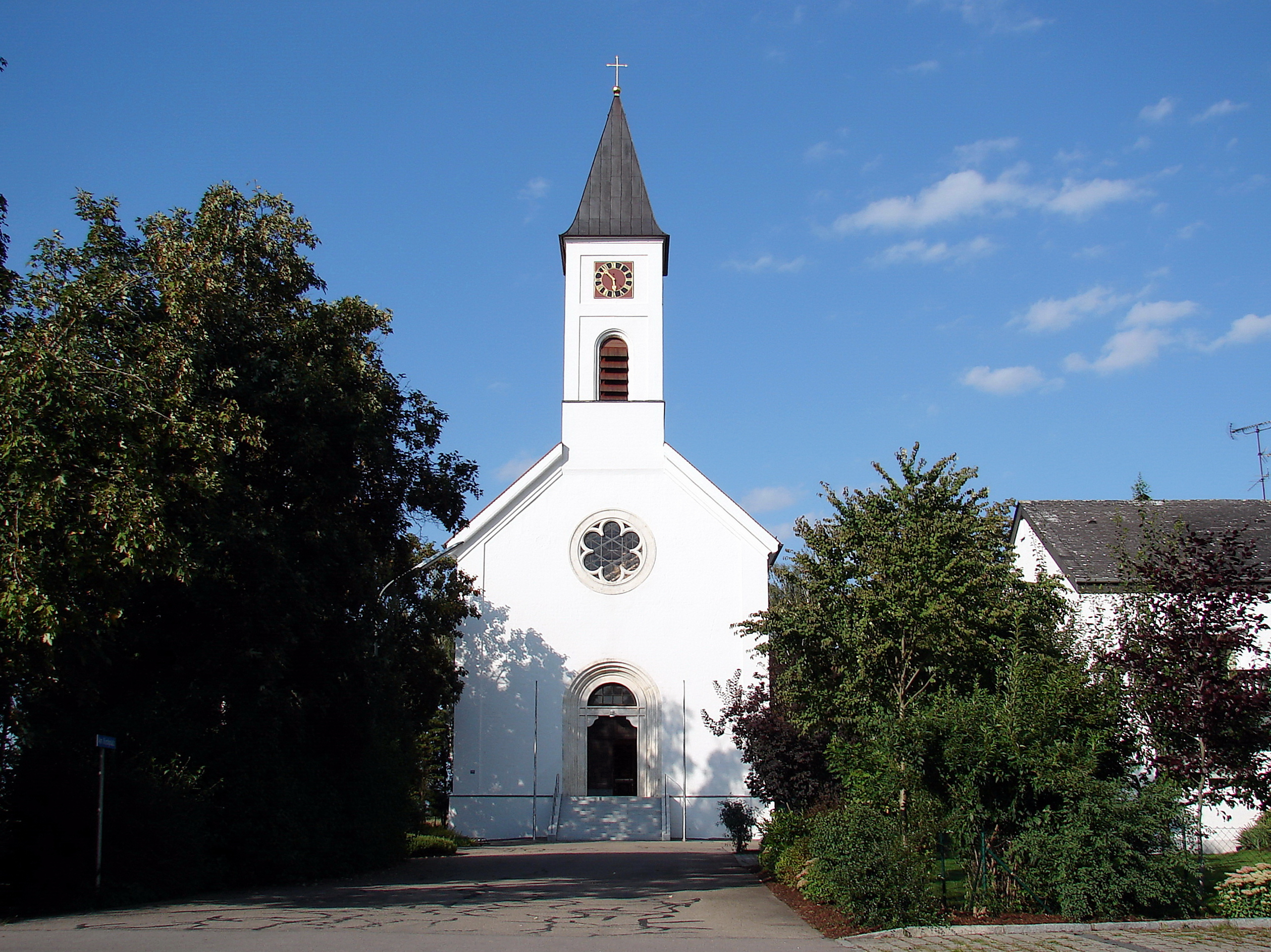 Katholische Pfarrkirche, neuromanischer Saalbau, errichtet nach Plänen Friedrich v. Gärtners, 1832-35; mit Ausstattung.